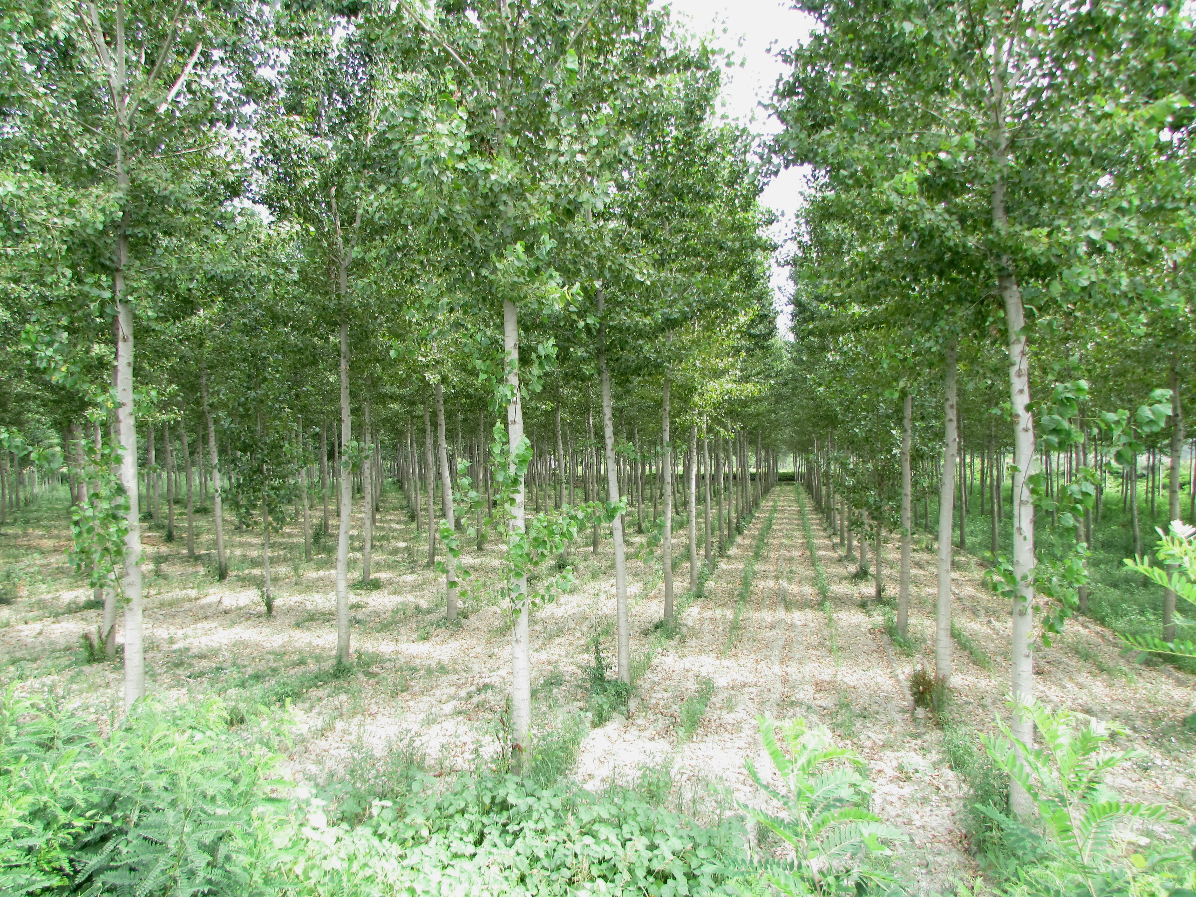 Pioppeto